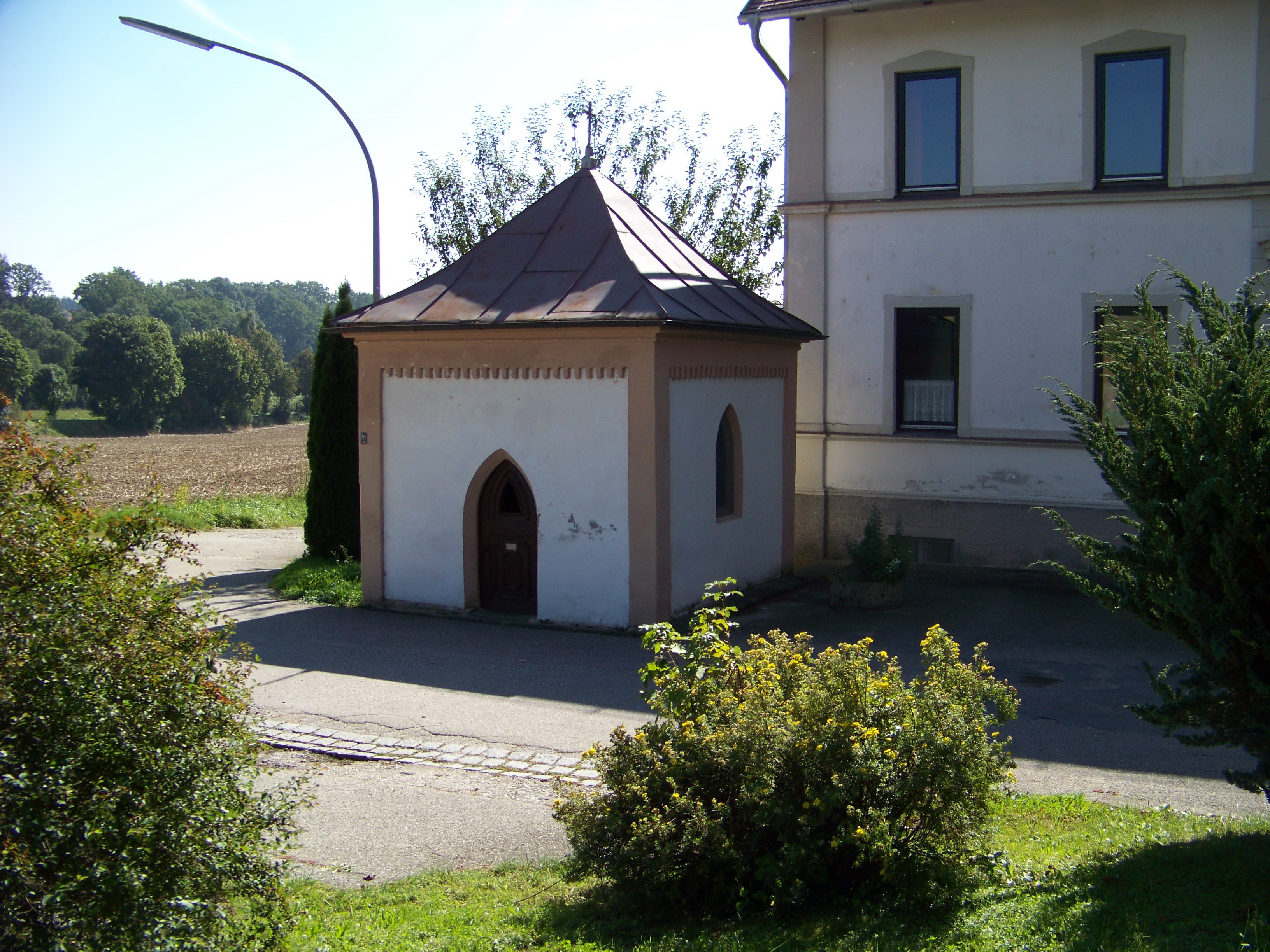 Hohenthann, Heiligenbrunn. Brunnenkapelle. 2. Hälfte 19. Jahrhundert; mit Ausstattung; westlich an der Straße.